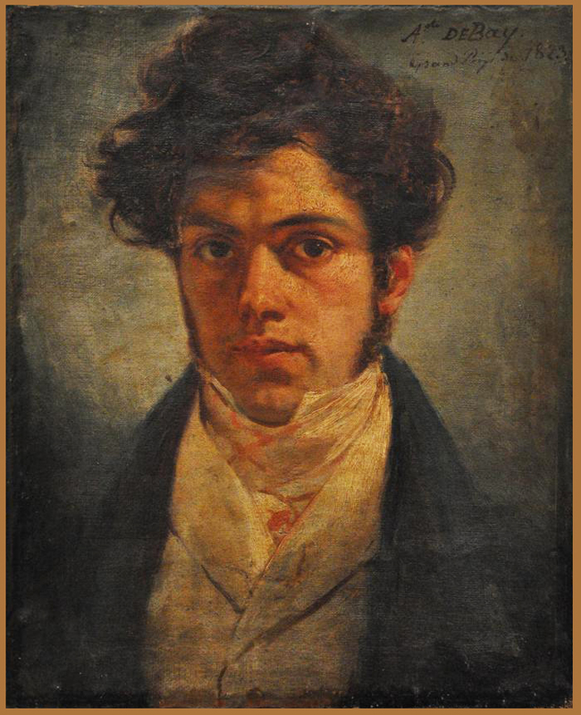 Auguste-Hyacinthe Debay